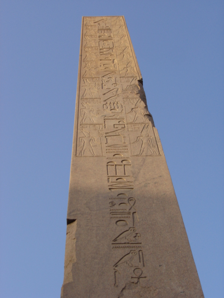 Obelisc de la reina-faraó Hatshepsut al temple de Karnak.